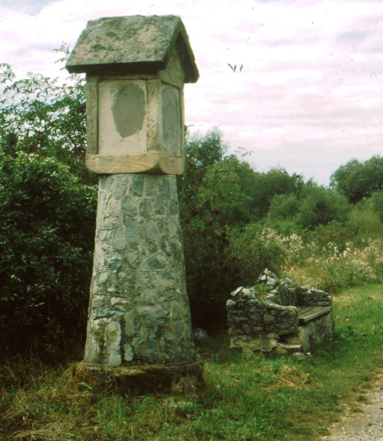 Autenhausen_im_Landkreis_Coburg,_Gedenkstein_an_der_ehemaligen_Zonengrenze